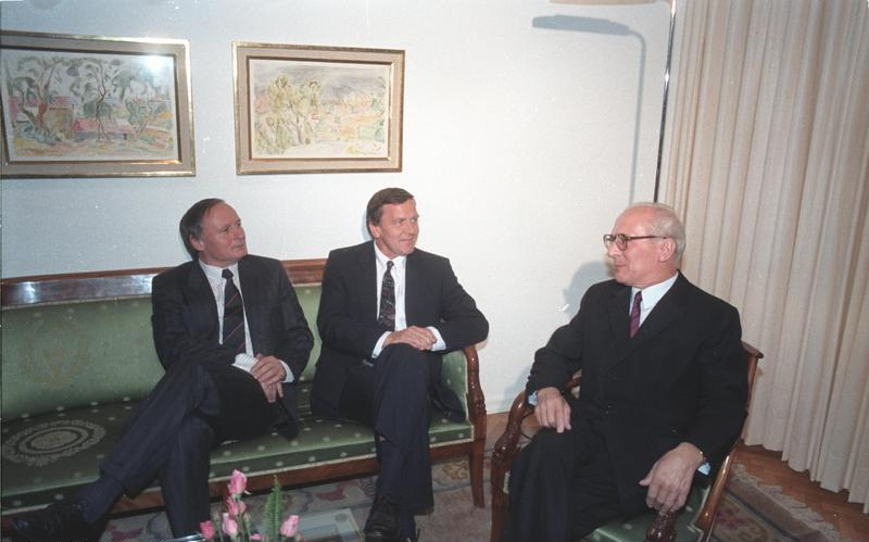 ADN-ZB/Sindermann/9.9.87/ BRD: Honecker-Besuch Der Generalsekretär des ZK der SED und Vorsitzende des Staatsrates der DDR, Erich Honecker, traf in Saarbrücken mit dem Ministerpräsidenten des Saarlandes, Oskar Lafontaine, stellvertretender Vorsitzender der SPD (l.), zusammen. Zugegen war auch der Vorsitzende der SPD-Fraktion im Landtag von Niedersachsen, Gerhard Schröder.